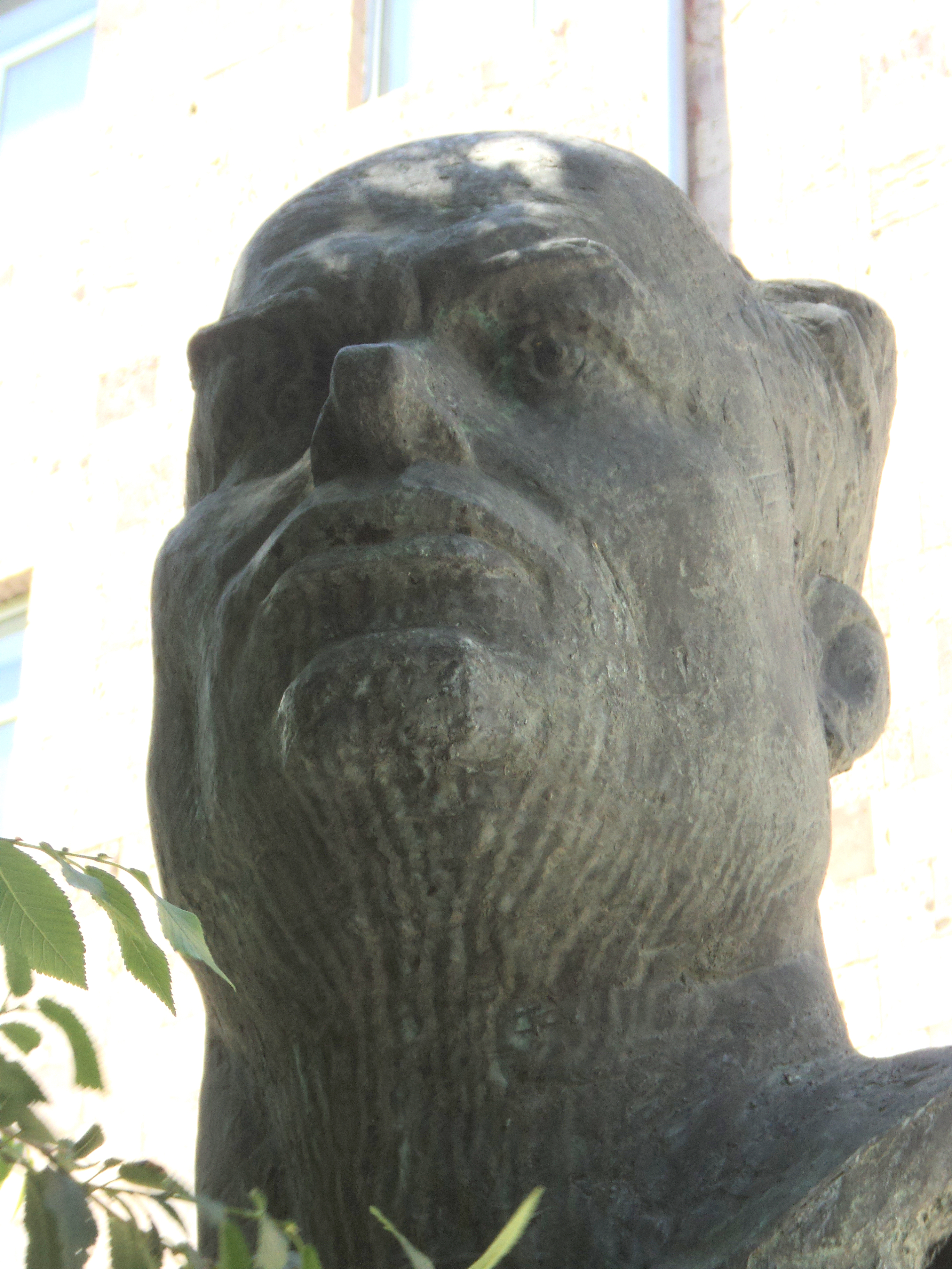 ՆԱԻՐԻ ԶԱՐՅԱՆ Քանդ.՝ Ն. Նիկողոսյան, Ճարտ.՝ Ջ. Թորոսյան, 1974 Հ. Հակոբյան փող. նրբ. 3, թիվ 130 համանուն դպրոցի առջև 3/9